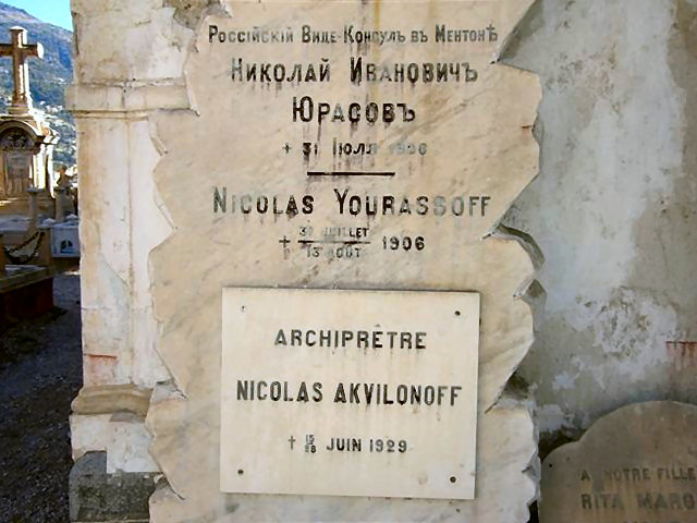 Photographie de la pierre tombale de Nicolaï Ivanovich Yourassof située à la gauche de la porte de la chapelle russe du cimetière du Vieux Château à Menton.